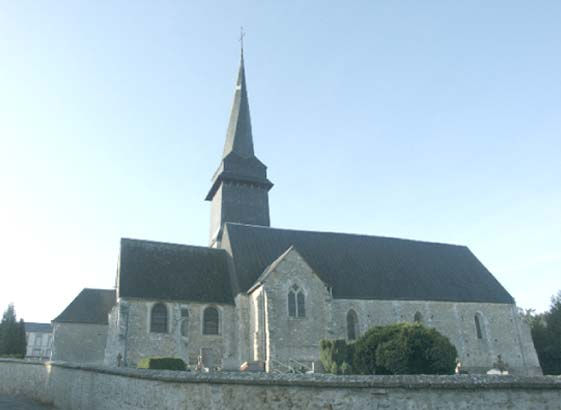 Vue nord de l'église Saint-Aubin de Saint-Aubin-sur-Gaillon.